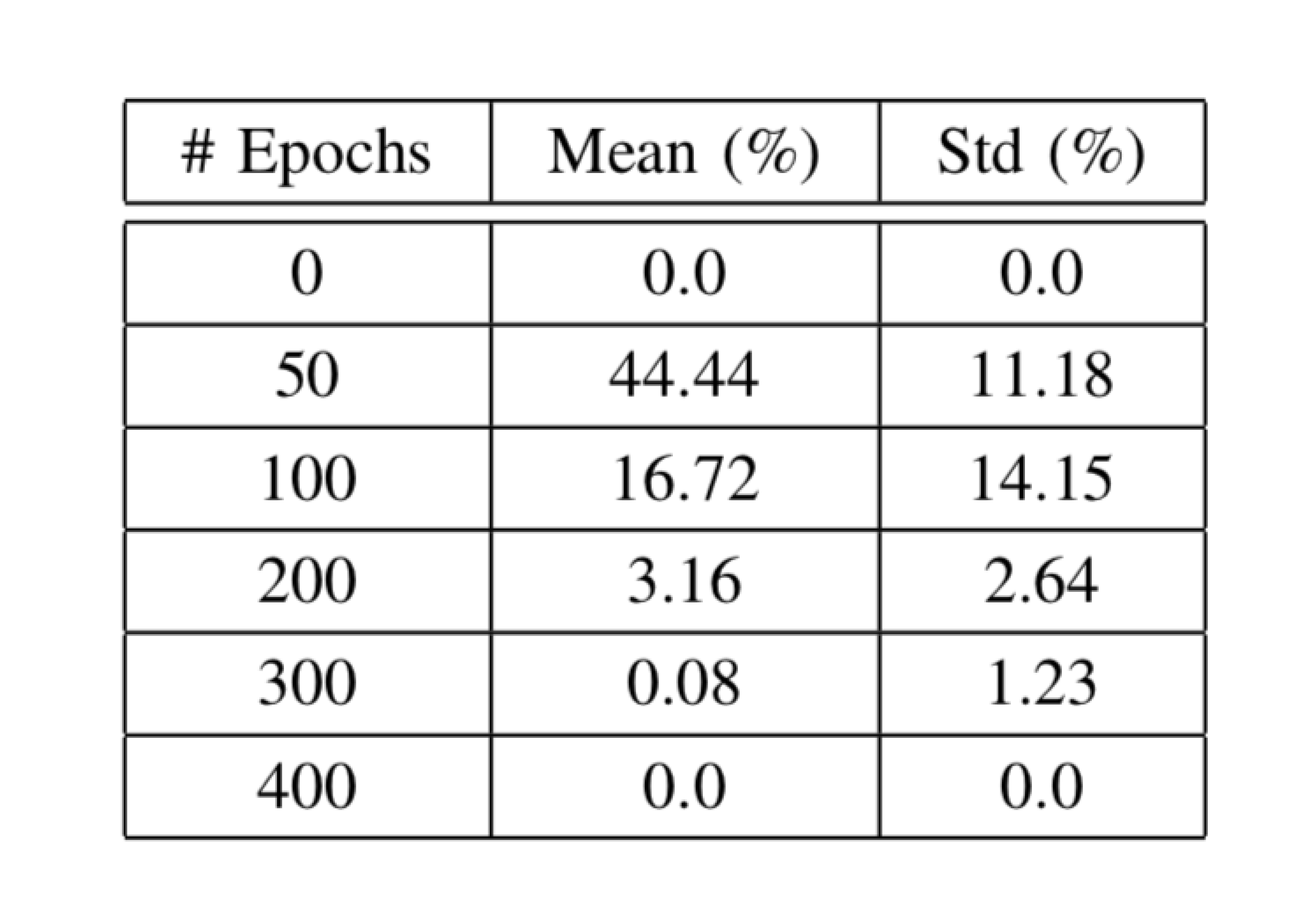 ПРОЦЕНТ РАЗБЛОКИРУЮЩИХ ДЕЙСТВИЙ НА ЧИСЛО УЧЕБНЫХ ЭПОХ В ПЯТИ РАЙНОВ